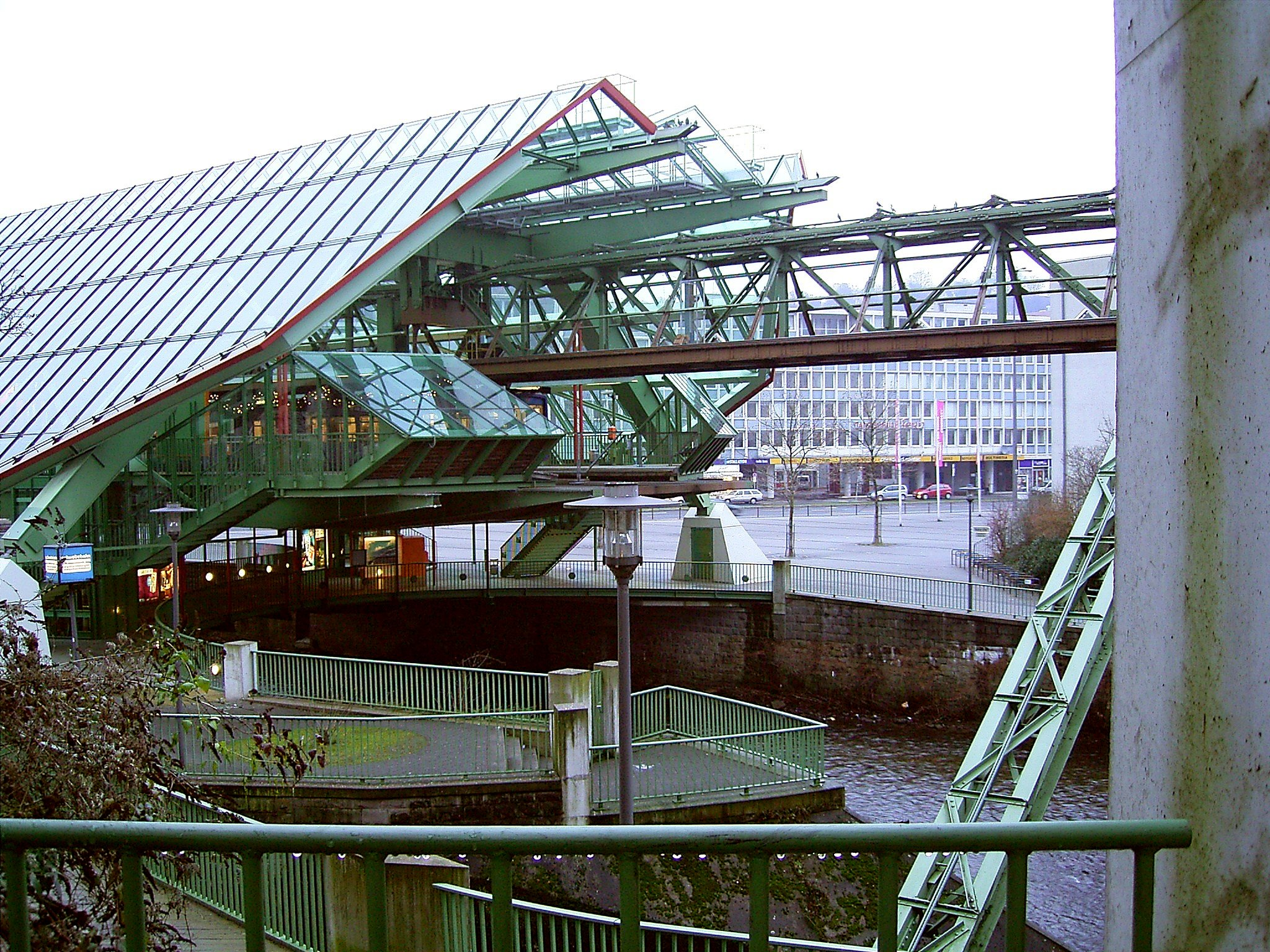 Schwebebahnstation Kluse in Wuppertal